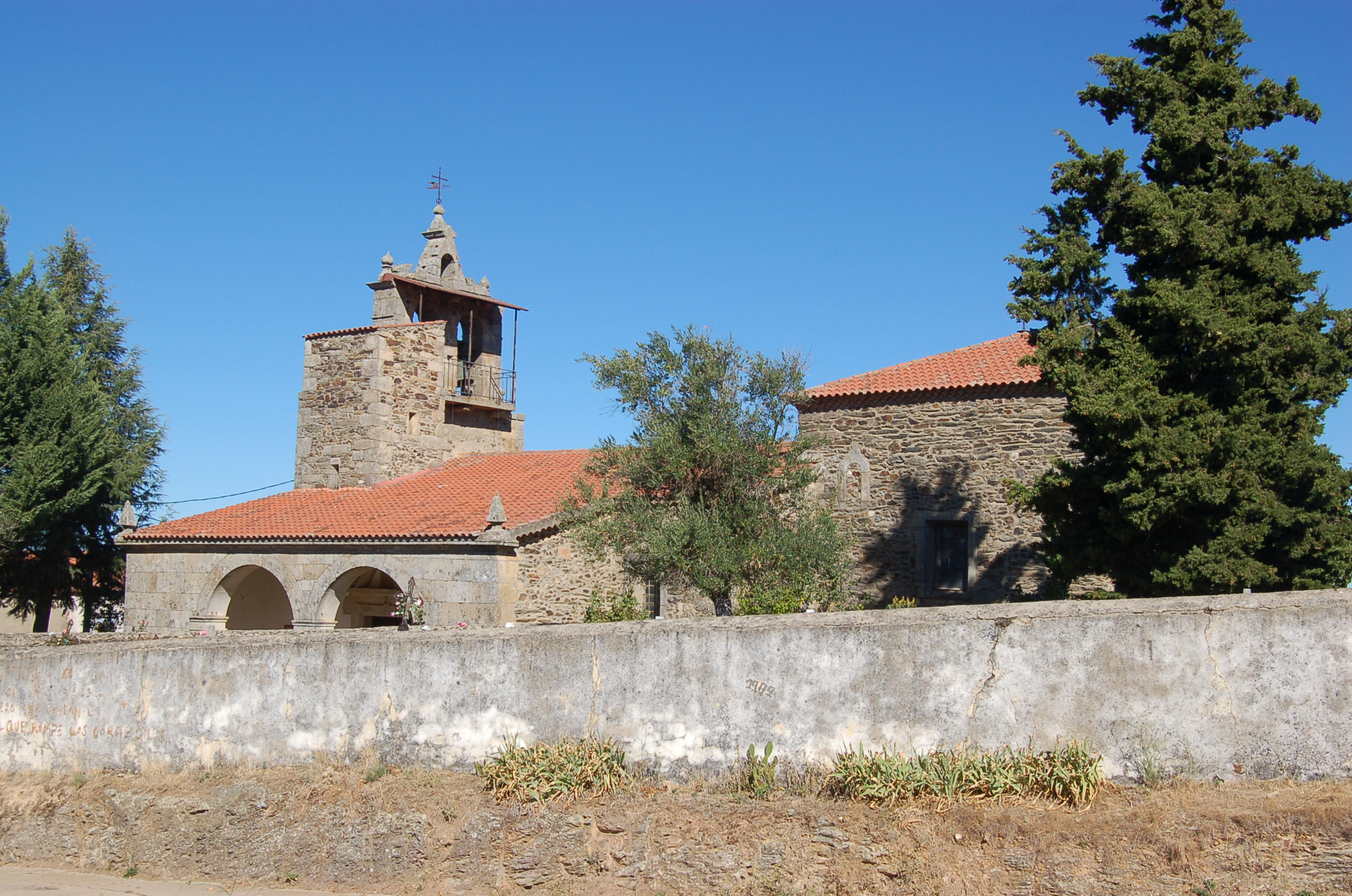 Igrexa de Viñas de Aliste